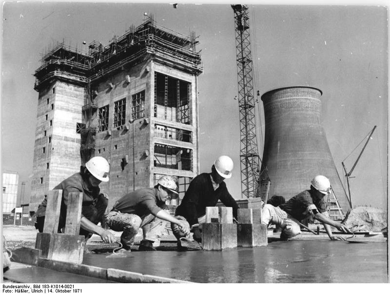 Kraftwerk Hagenwerder, Bauarbeiter ADN-ZB Häsler-14.10.1971-bi Bez. Dresden: Kraftwerk Hagenwerder - ausgezeichnet als "Betrieb der sozialistischen Arbeit"-Die Mitgleider der Brigade Krebs ( hier beim Glätten von Beton für eine Maschinenhalle) gehören zu den Erbauern des Kraftwerkes Hagenwerder im Kreis Görlitz. Sie verbinden die Wahlvorbereitungen mit dem Wettbewerb um den weiteren Ausbau ihrer zum 22. Jahrestag der DDR erzielten guten Planergebnisse. In Gemeinschaftsarbeit mit polnischen Facharbeitern und Ingenieuren wird alles darauf konzentriert, planmäsig und in hoher Qualität die termingerechte Montage sowjetischer Kraftwerksaggregate zu gewährleisten. An allen Objekten sind schon seit Monaten durch die Gewerkschaftsgruppen gründliche Wintervorbereitungen für den Mehrschichtbetrieb getroffen worden. (Vgl. Foto K 1014-20 N)